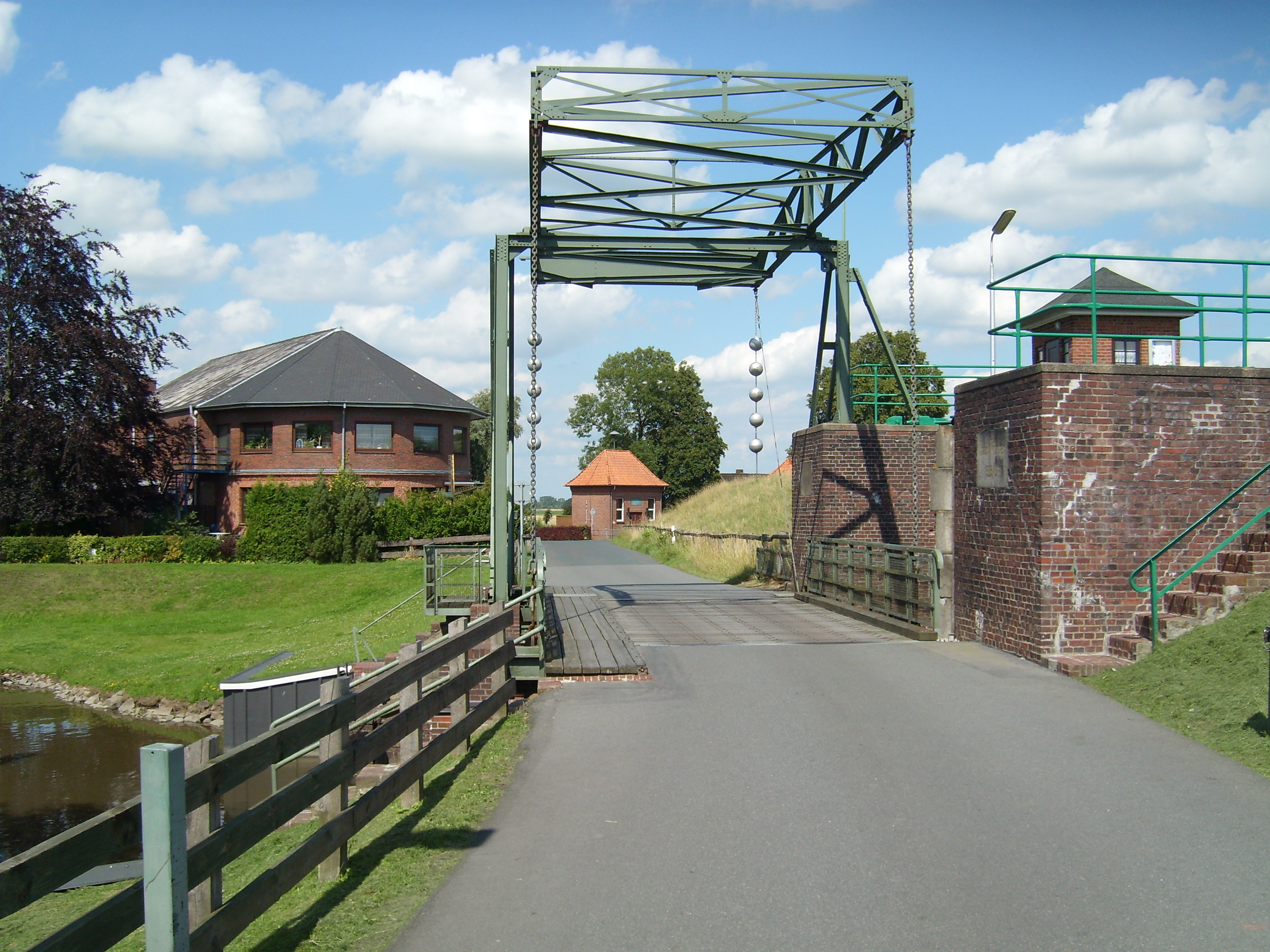 Straßenbrücke bei der Schleuse Kasenort. Im Hintergrund (Bildmitte) zu sehen ist das 1955/56 erbaute Schöpfwerk, über das die Große Feldwettern in die Stör entwässert.